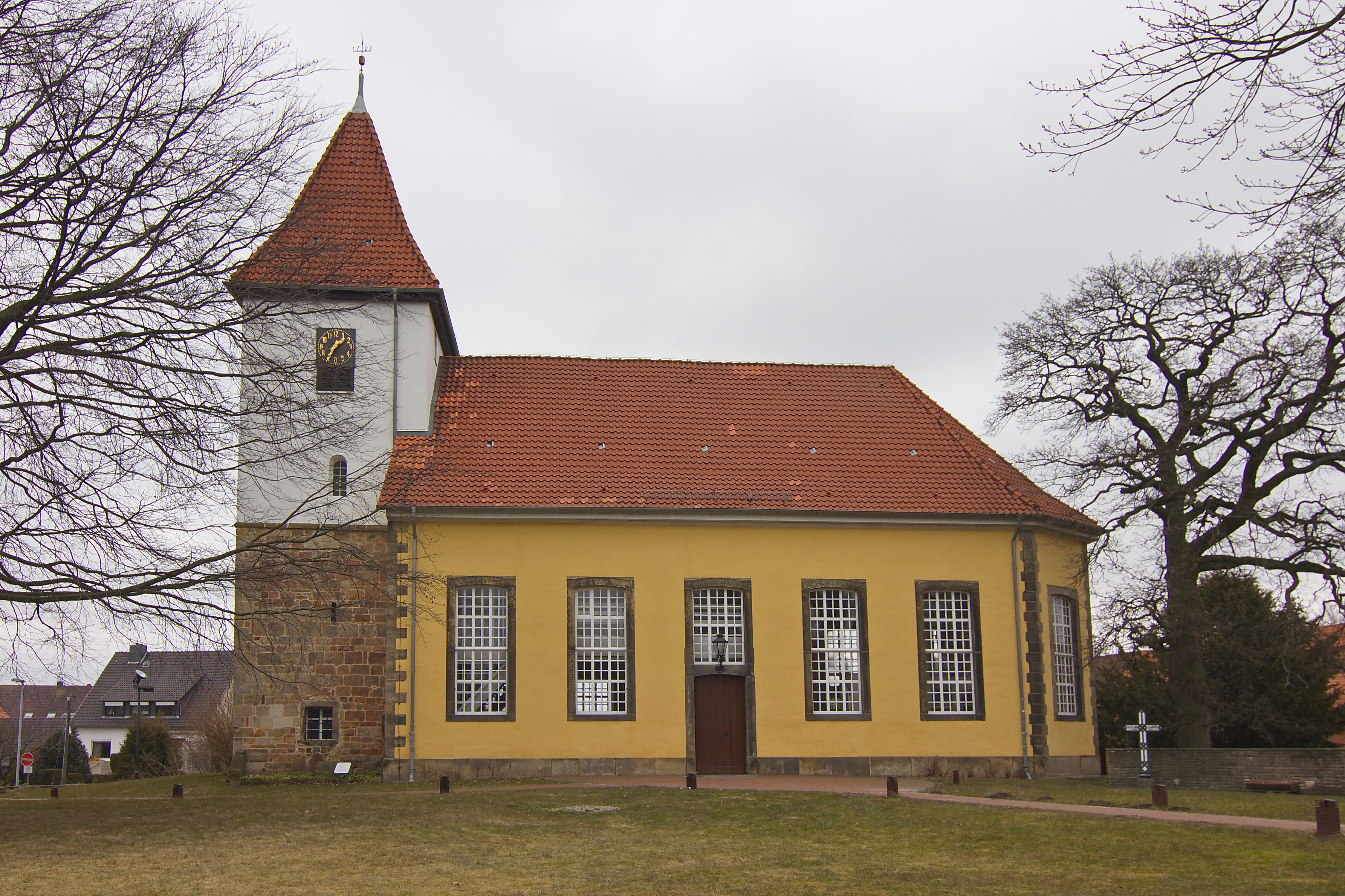 Dreieinigkeitskirche in Kirchwehren (Seelze)